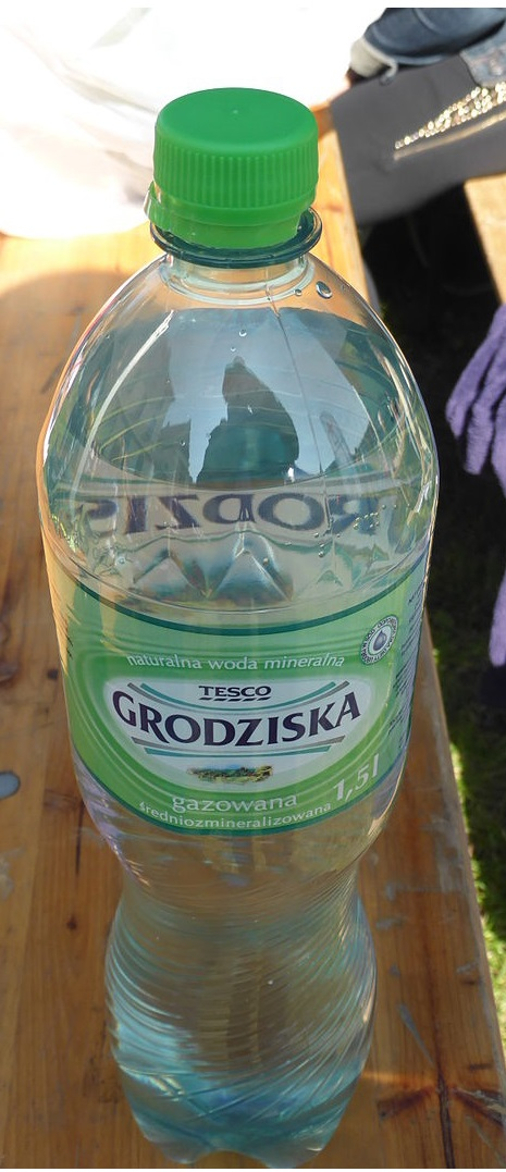 Woda Grodziska (dla sieci Tesco)